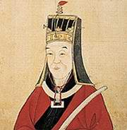 Zhang Shicheng